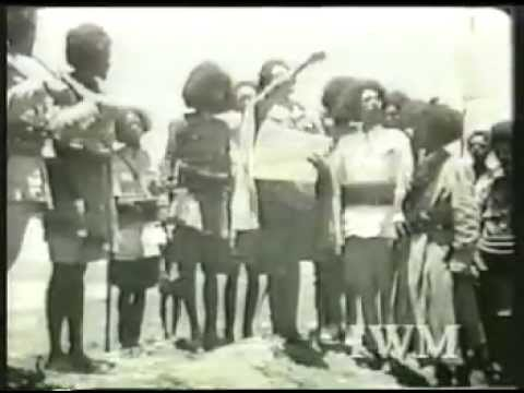 Riunione di capi "arbegnuoc" durante la resistenza etiope contro l'occupante italiano in Africa orientale